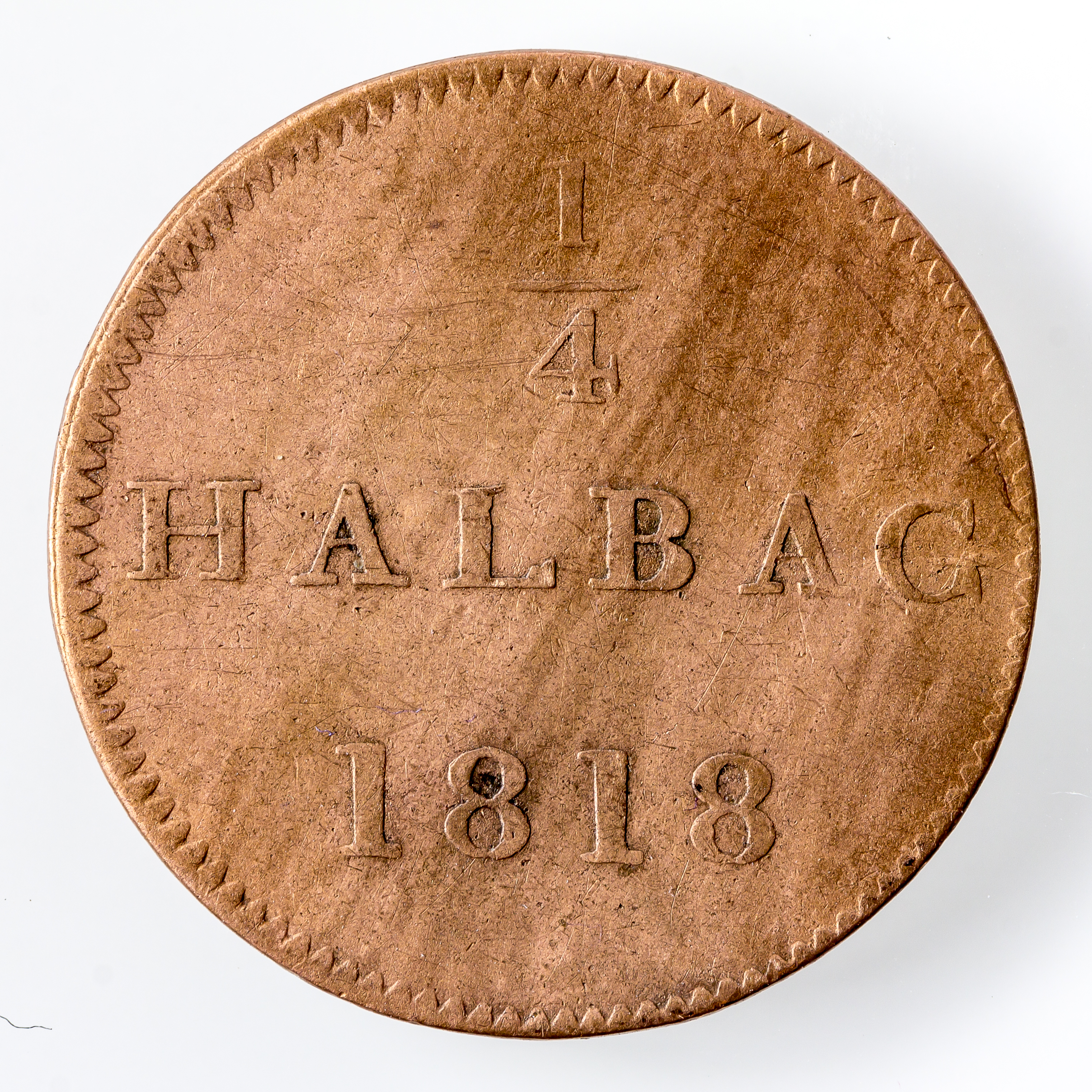 Judenpfennig 1/4 Halbag 1818